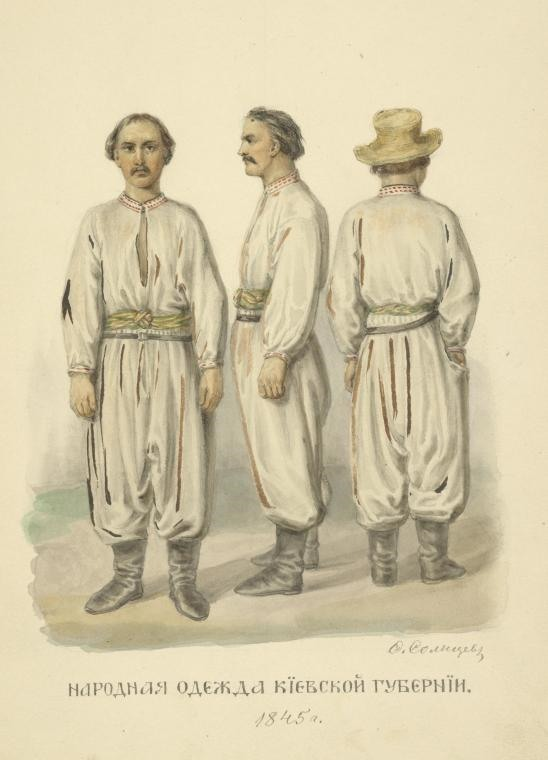 Народне вбрання Київської губернії 1845: Куренівка